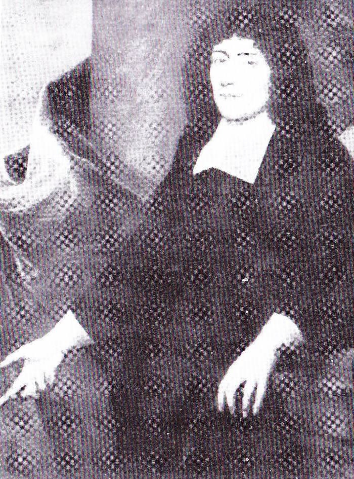 Franz Caspar von Francken-Sierstorff, Weihbischhof in Köln